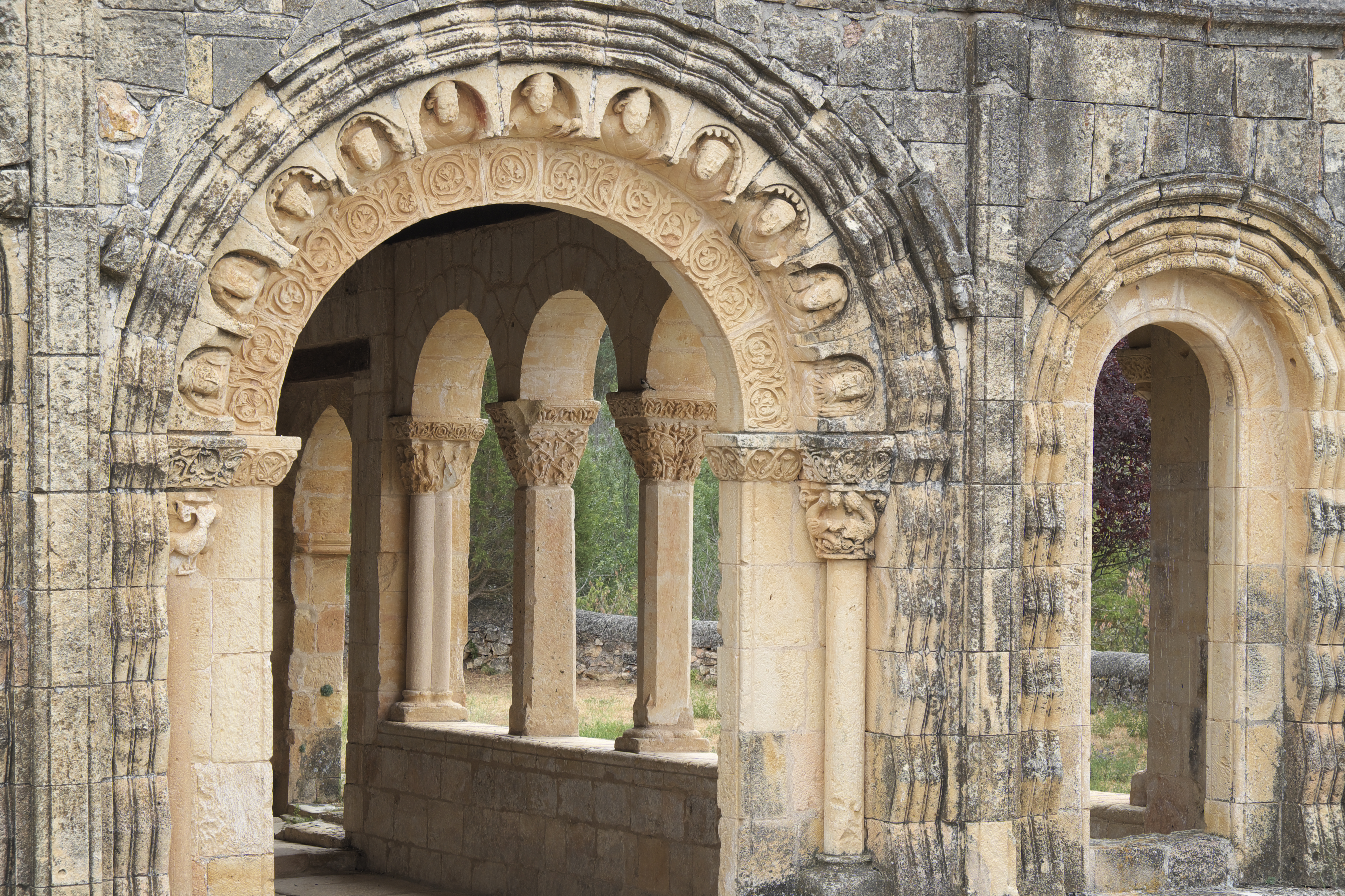 Katholische Kirche San Juan Bautista in Revilla de Orejana (Orejana) in der Provinz Segovia (Kastilien und León/Spanien)